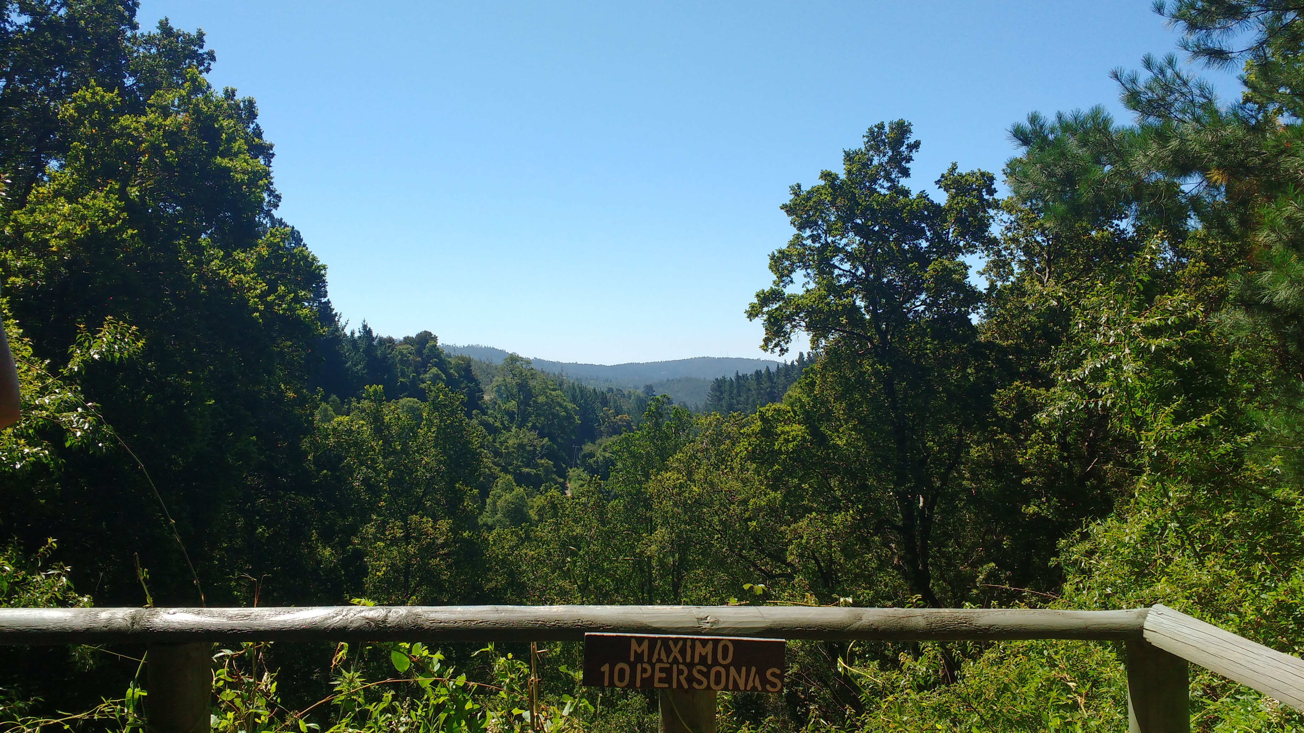 Vista desde uno de los miradores de la reserva nacional nonguén.